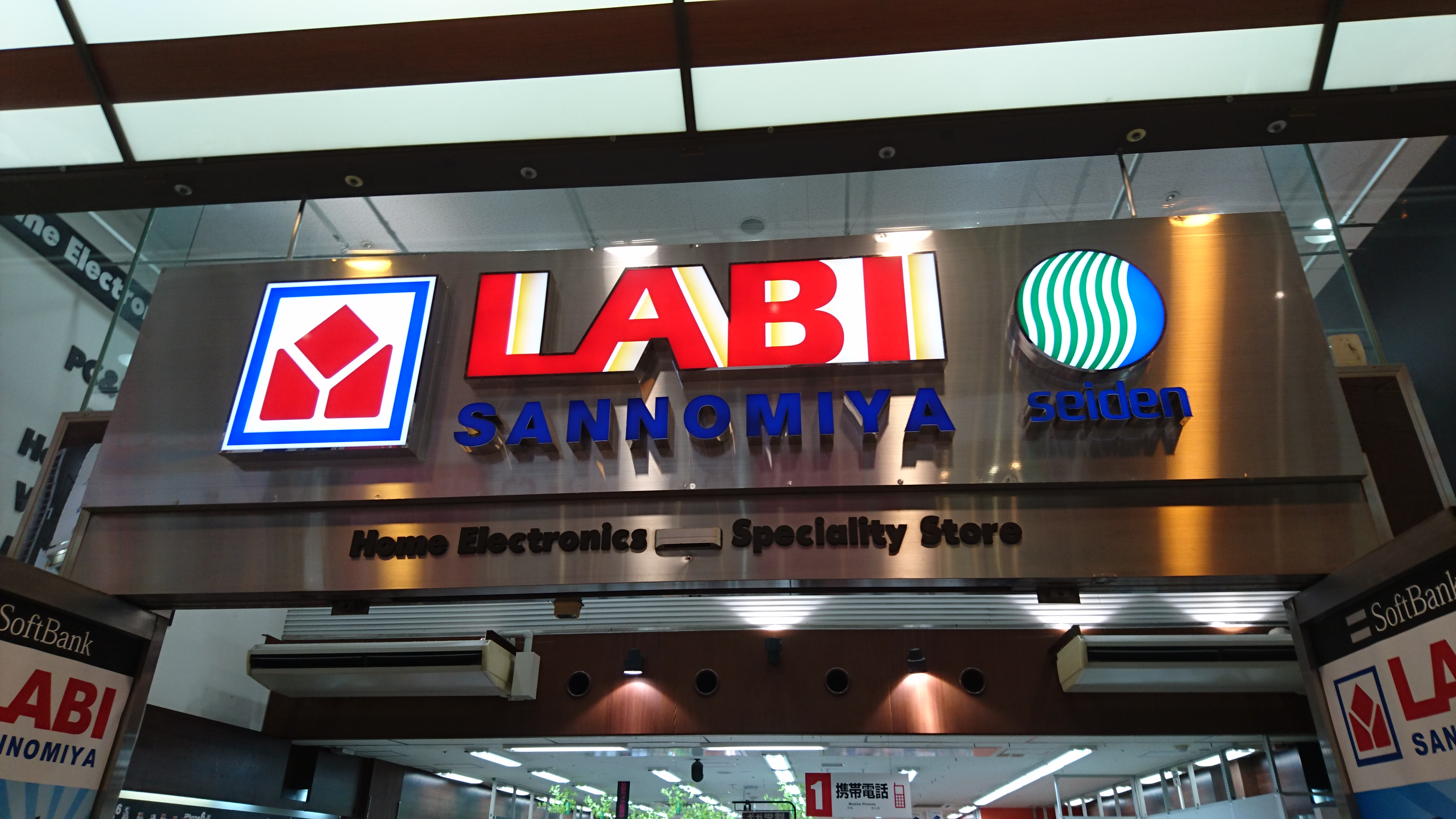 ヤマダ電機 LABI三宮 1F外観 星電社ロゴ付き 2016年5月27日 17時28分にUser:ぷんてぃが撮影